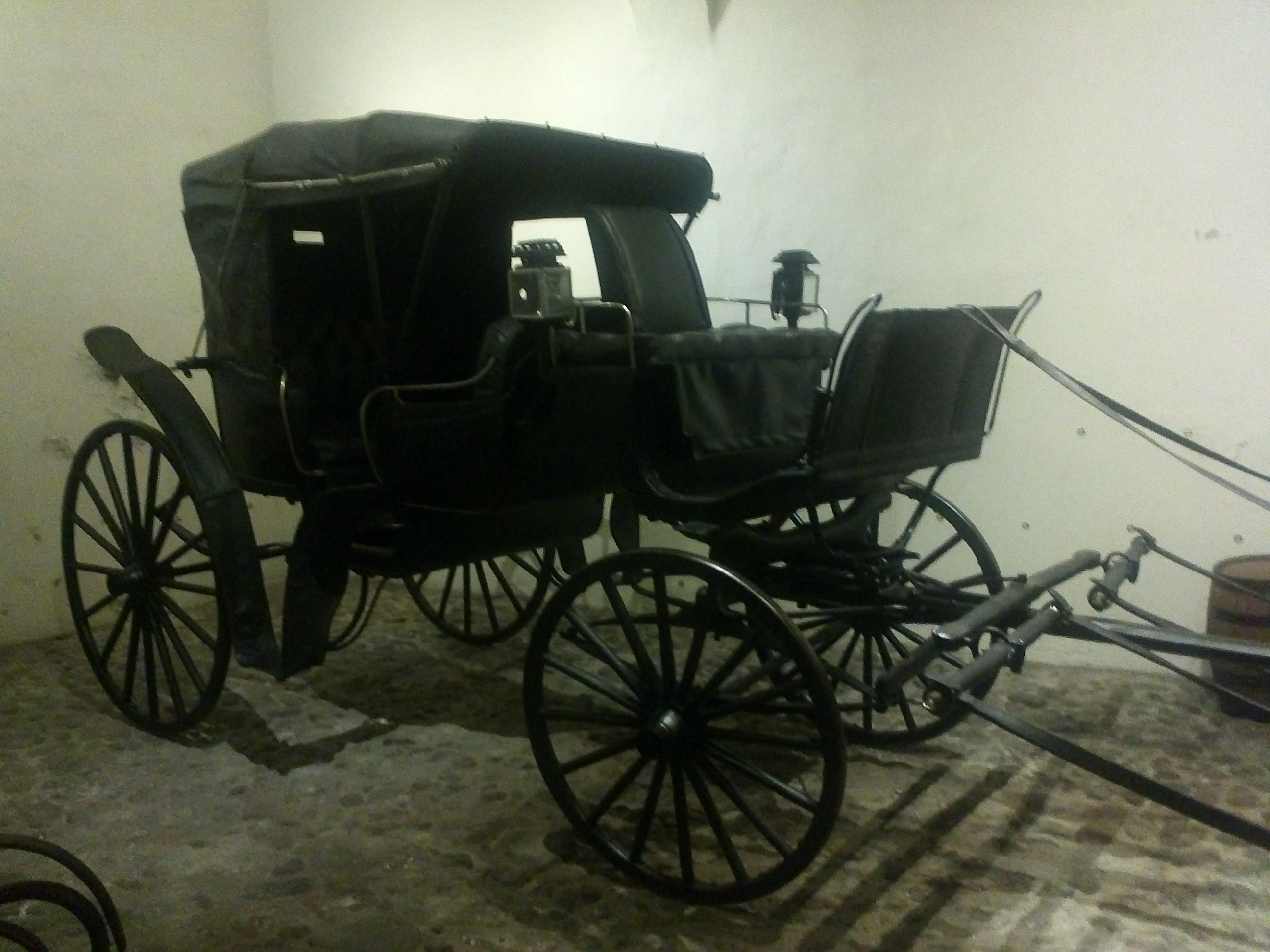 Caballeriza Casa de Aquiles Serdán, Puebla